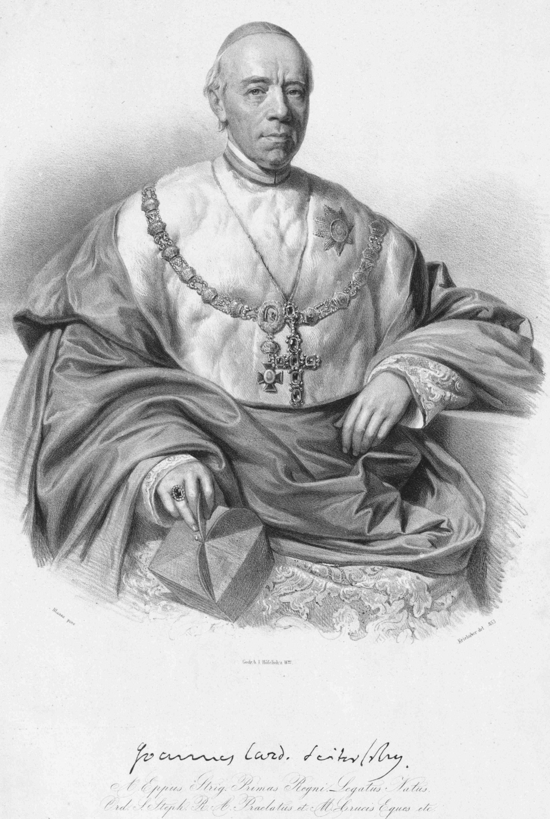 János Scitovsky de Nagy-Ker (1785-1866), Erzbischof von Esztergom, Kardinal.